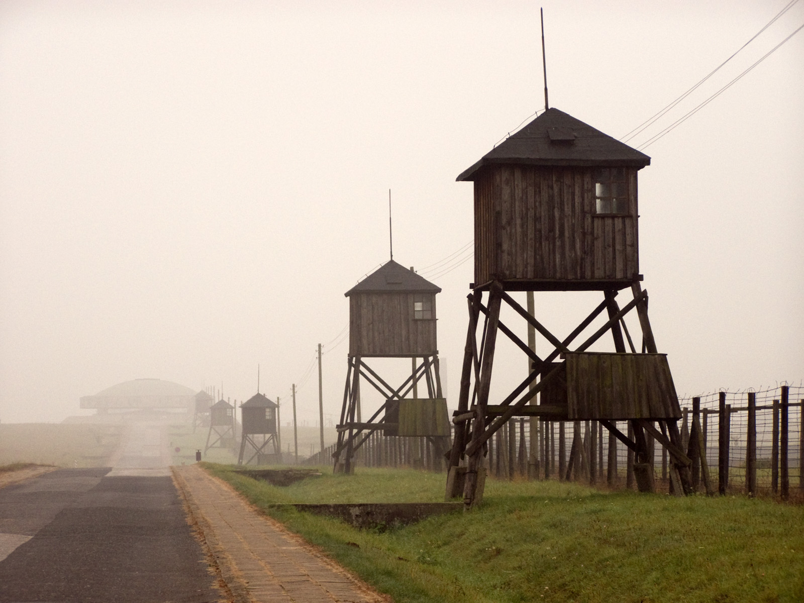 KL Majdanek. Mglisty październikowy poranek.